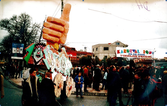 Shkoder 2006